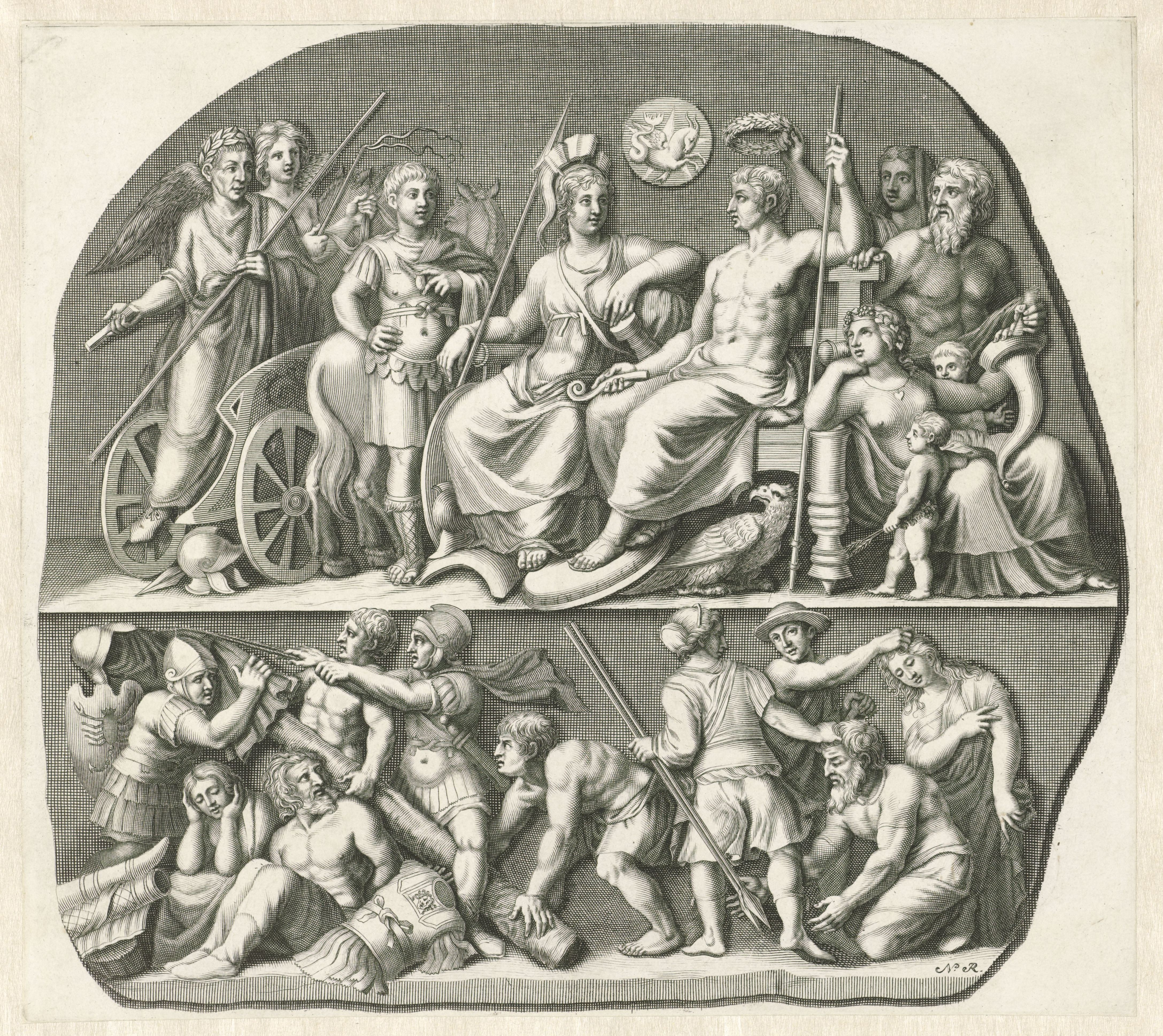 Print van camee "Gemma Augustea" .Op de Gemma Augustea staan twee scènes. Op het bovenste tafereel een Romeinse heerser (mogelijk keizer Augustus) met lauwerkrans boven het hoofd. Hij wordt omringd door diverse goden, zoals Neptunus en Jupiter, in de vorm van een adelaar. De vrouw met de helm is Roma, de personificatie van de stad Rome. Links Victoria met haar wagen. Op de onderste scene worden links twee figuren aan een houten staak vastgemaakt. Rechts worden een man en een vrouw aan hun haren meegevoerd.